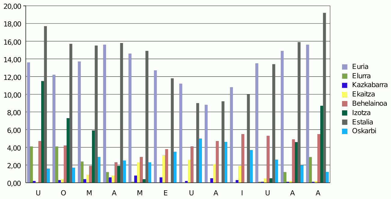 Prezipitazio motak Gasteizen (1930-1990 urteen batez bestekoa)